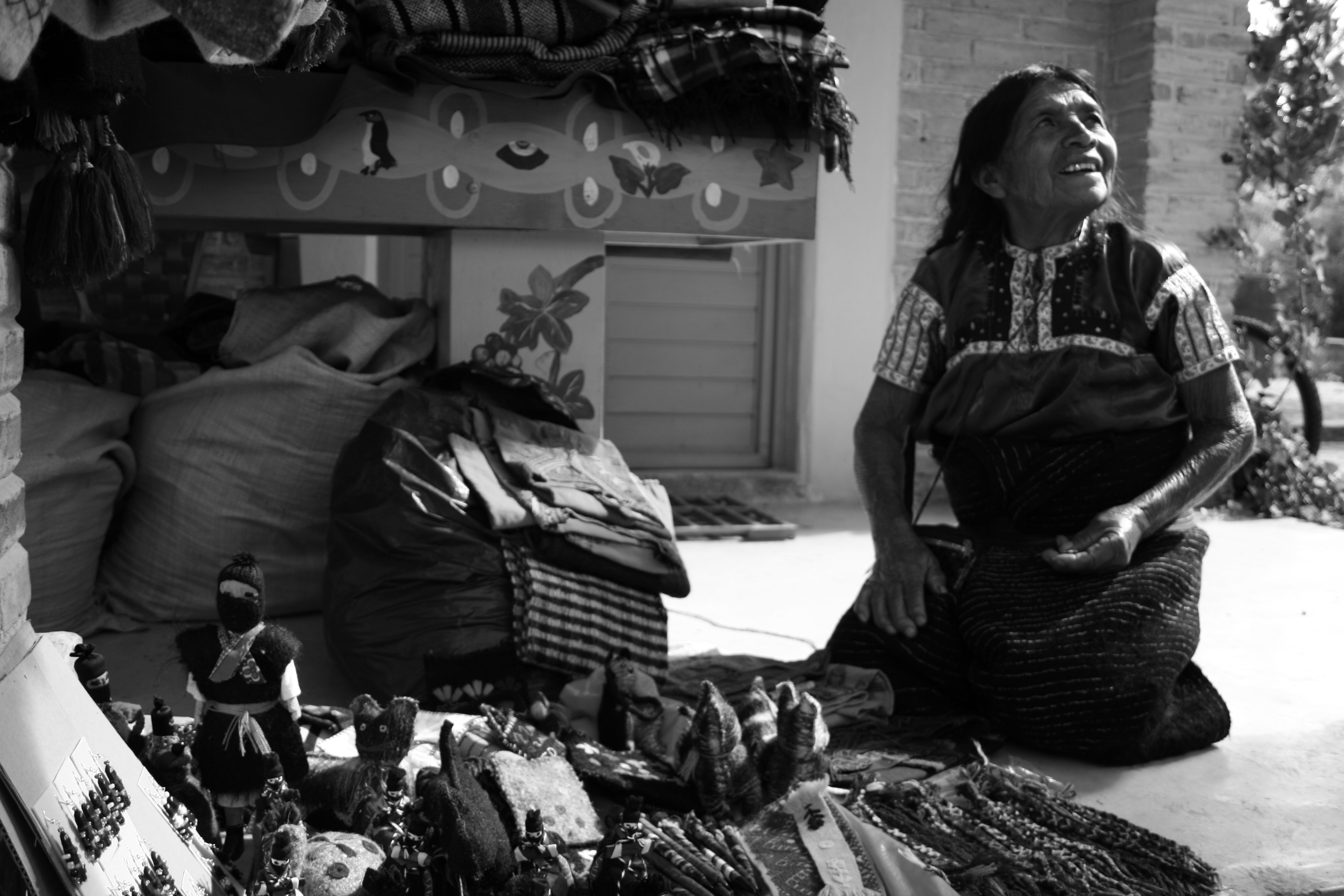 Vendedora y artesana de los Altos de Chiapas, de origen Tzotzil